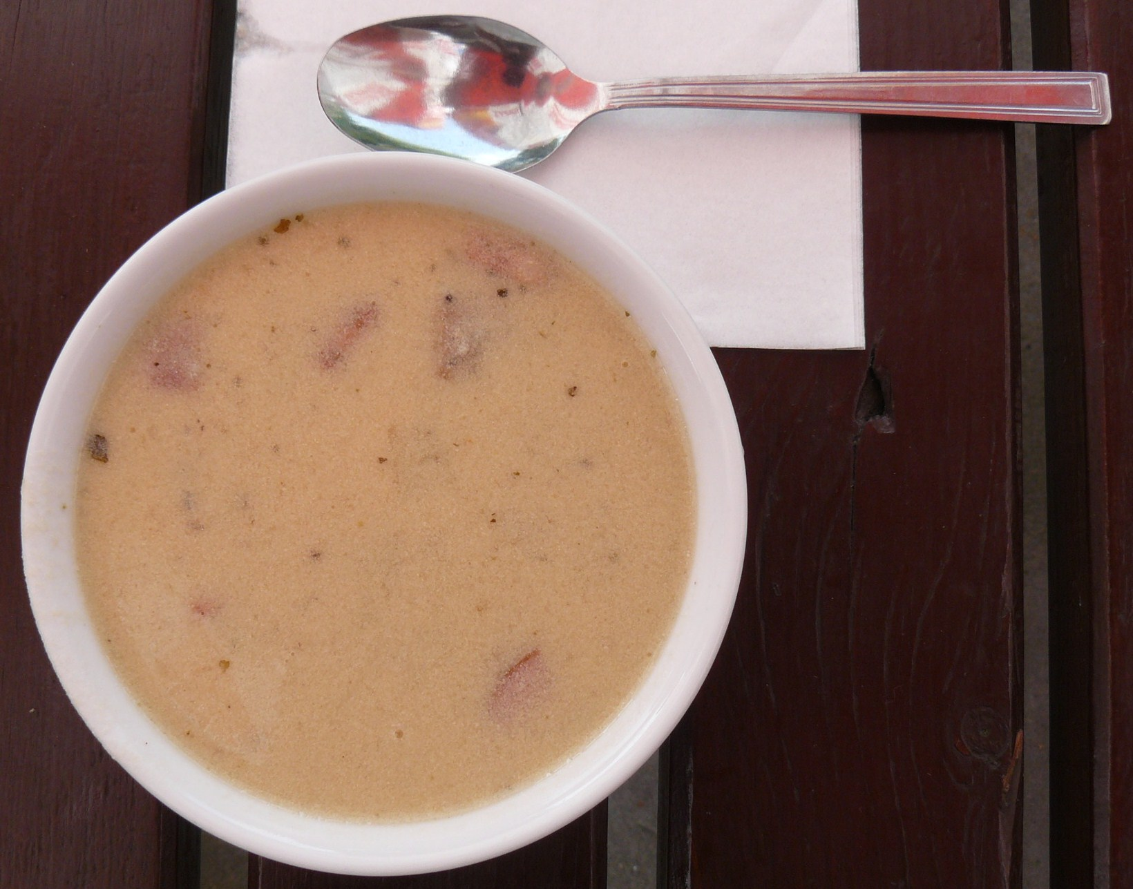 Zalewajka pomorska serwowana w Pile.